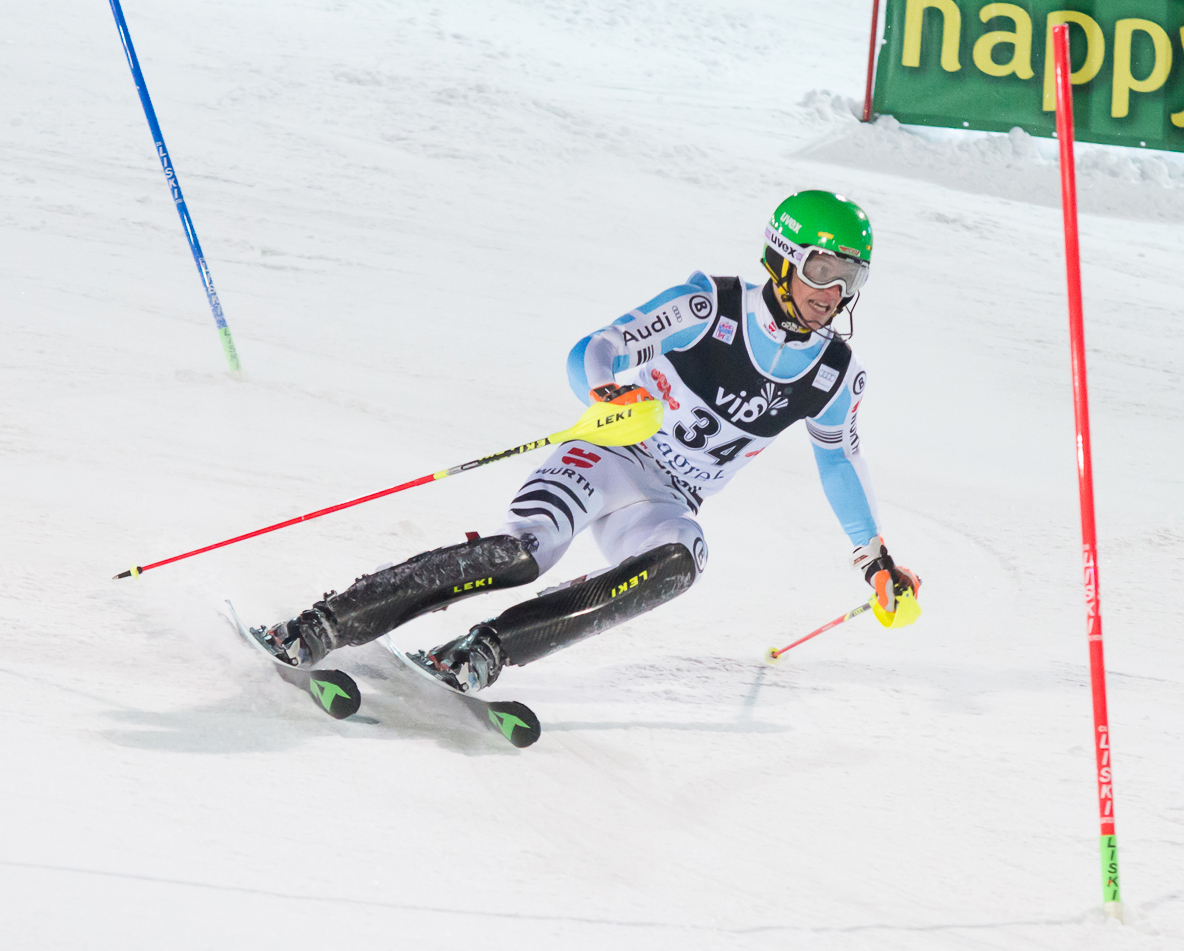 Linus Straßer (1992), alpine skier from Germany